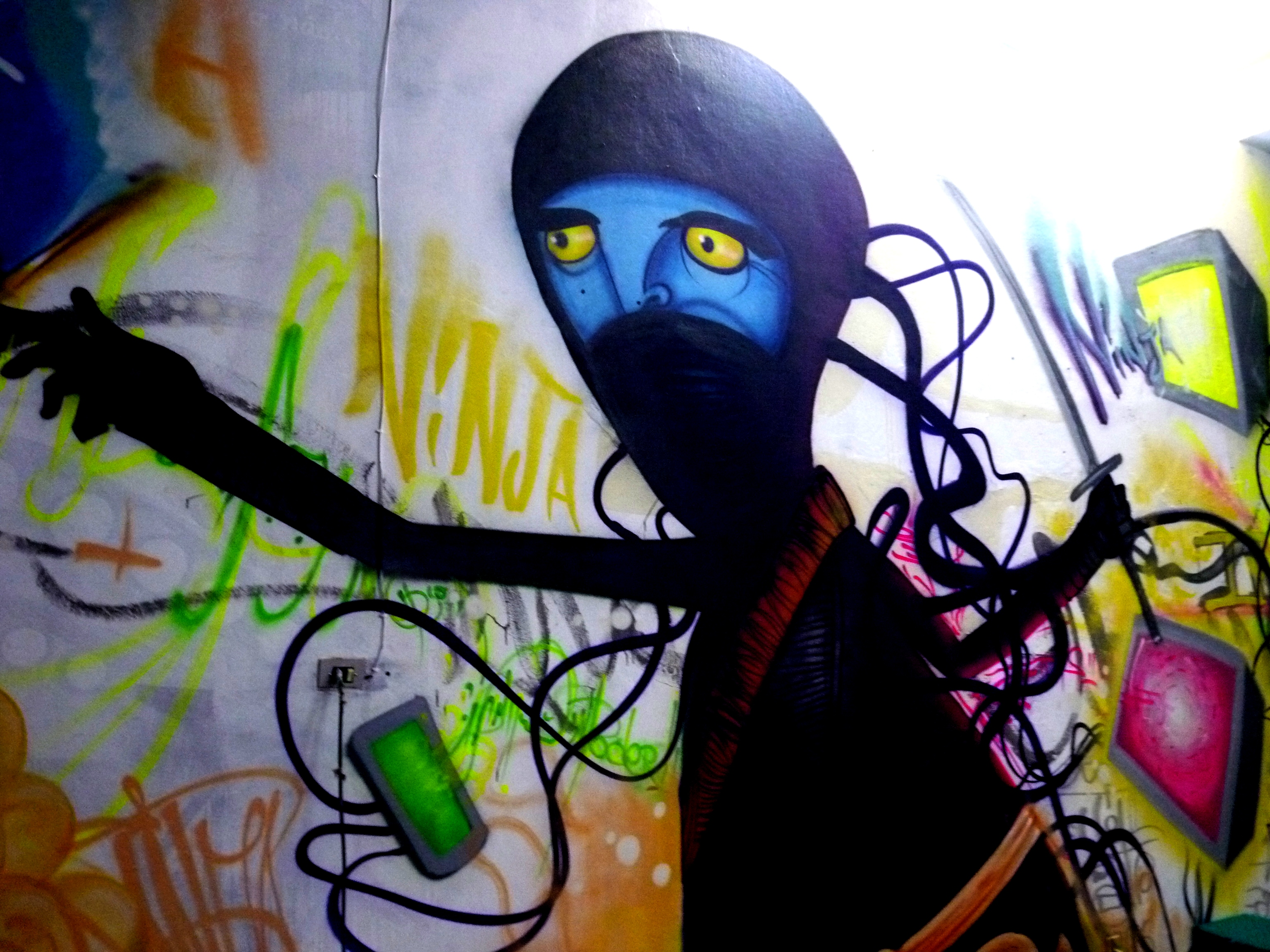 Graffiti Ninja